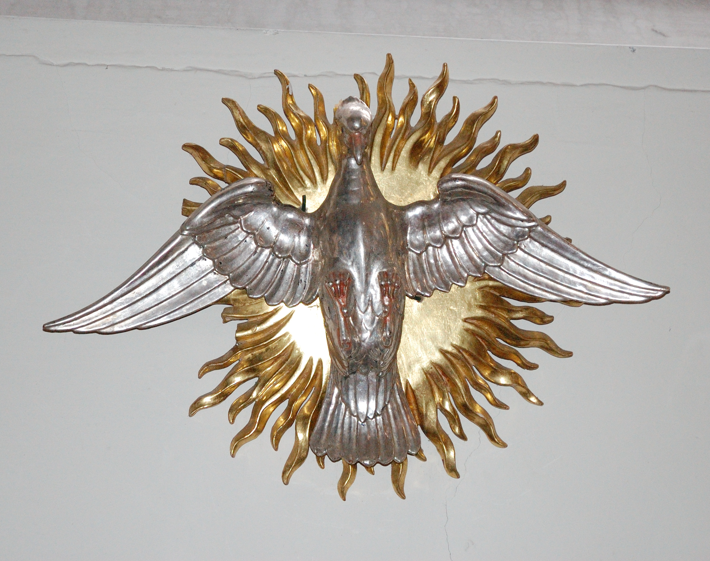 St. Nikolauskirche Mitteleschenbach, Heiliger Geist